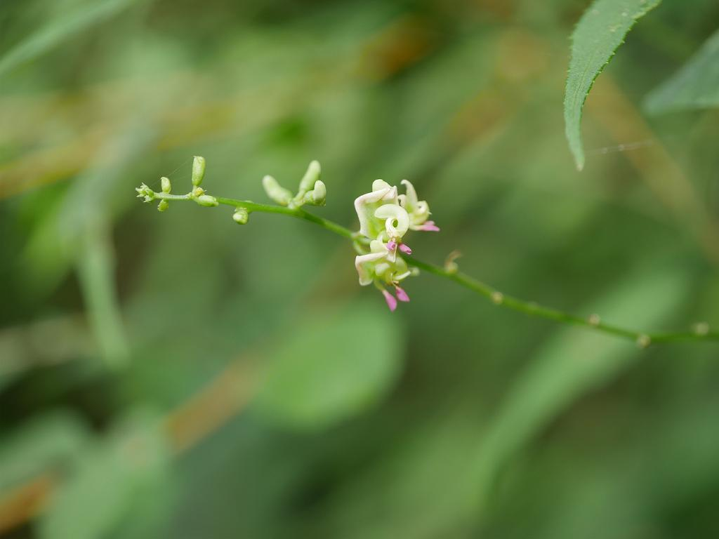 Apios fortunei：ホドイモ 2018/08/11 和歌山県田辺市：Tanabe City. Wakayama Pref. Japan